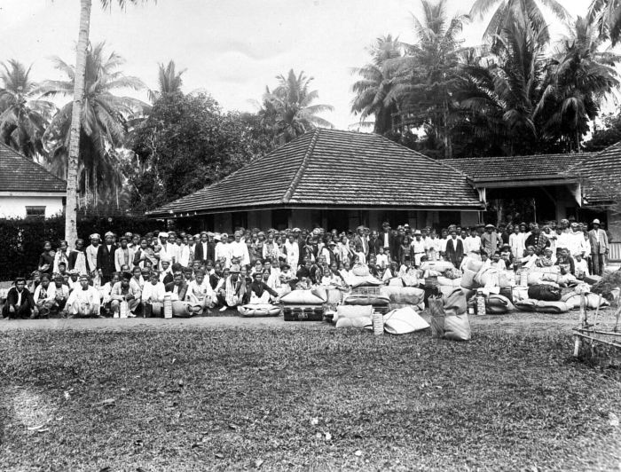 Repronegatief. In het topjaar 1929 werkten er in 'het Cultuurgebied' (het Gouvernement Sumatra's Oostkust) ruim 260.000 contractarbeiders. Er waren er 235.000 van Java afkomstig. Contractarbeiders sloten een contract volgens de koelie-ordonnantie (van 1880), waarop een zogeheten 'poenale sanctie' rustte. Dat hield in dat een arbeider die voor de beëindiging van het contract de onderneming verliet ('desertie') met dwangarbeid gestraft kon worden. Vooral in de 'wildwest' periode van de plantage-economie in deze regio was dit niet de enige misstand. De sterfte onder de koelies was zeer hoog en mishandeling ('klapzaken') kwam regelmatig voor. In 1931 werd een begin gemaakt met de afschaffing van de poenale sanctie. (P. Boomgaard, 2001). Javaanse koelies keren, na werkzaamheden op Sumatra verricht te hebben, terug naar Java Koelies die op Sumatra gewerkt hebben keren terug naar Java, Sumatra's Oostkust, ca. 1925